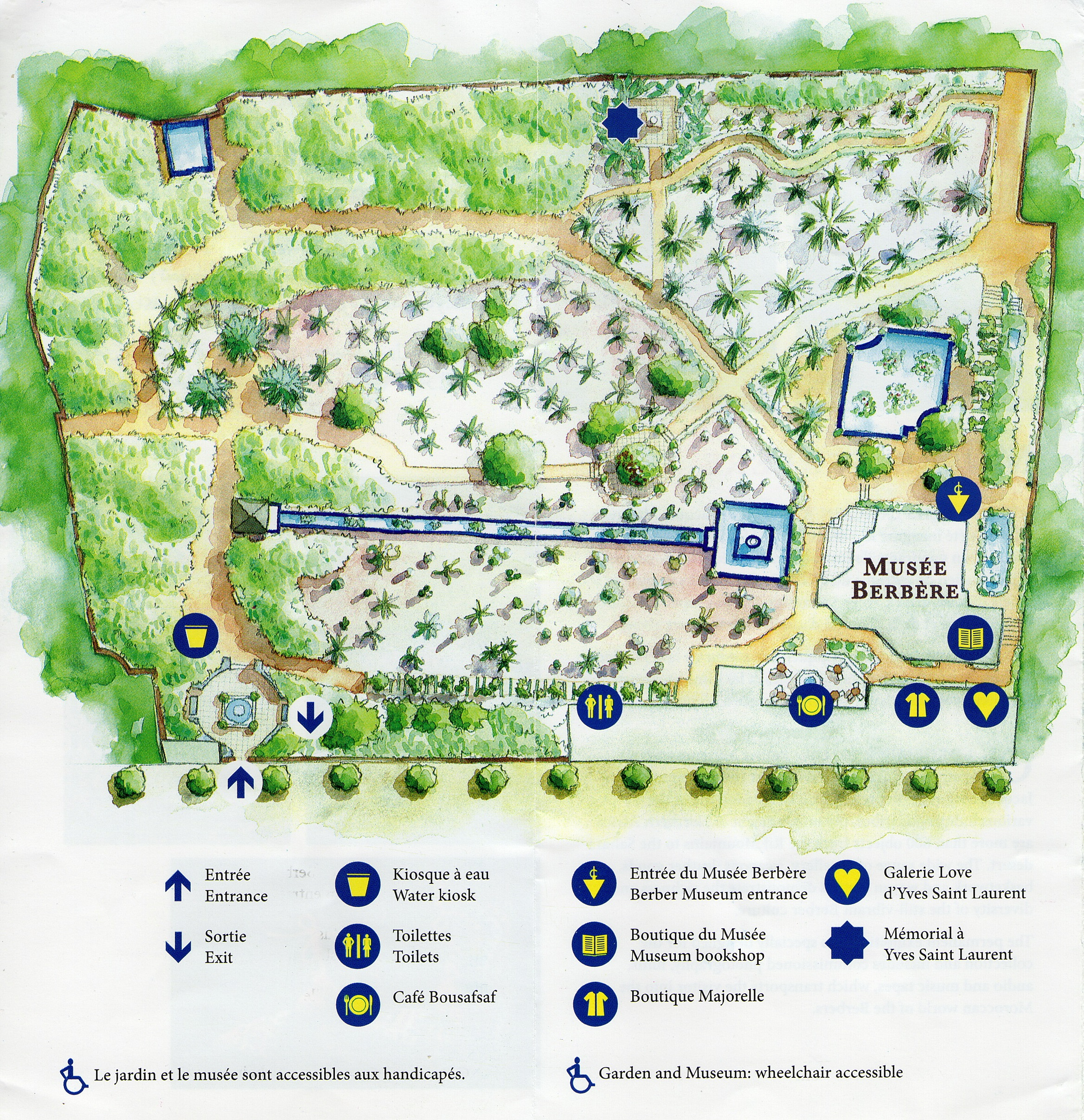 Plan du Jardin Majorelle à Marrakech avec les différents services sur place (au 14/08/2014)